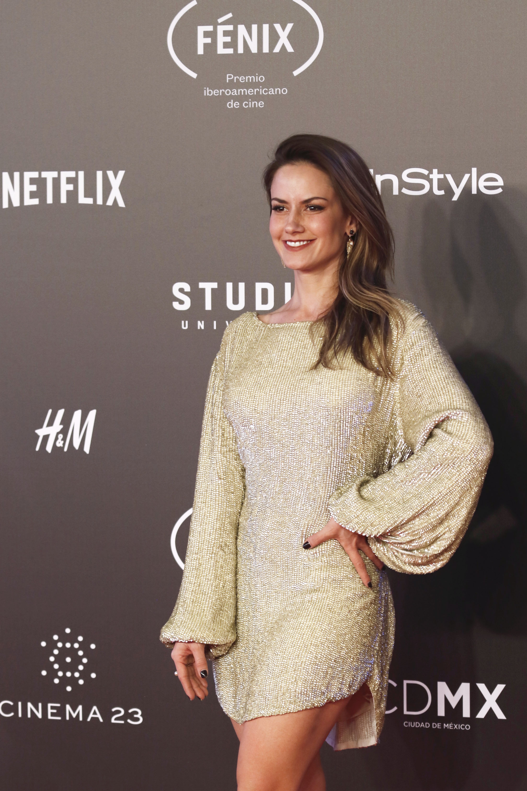 Miércoles 6 de diciembre de 2017. En el Teatro de la Ciudad Esperanza Iris, se realizó la 4ª Entrega del Premio Iberoamericano de Cine, Fénix, previo a la ceremonia, nominados, conductores, presentadores y elencos, desfilaron por la alfombra roja. Fotografía: Milton Martínez / Secretaría de Cultura CDMX.